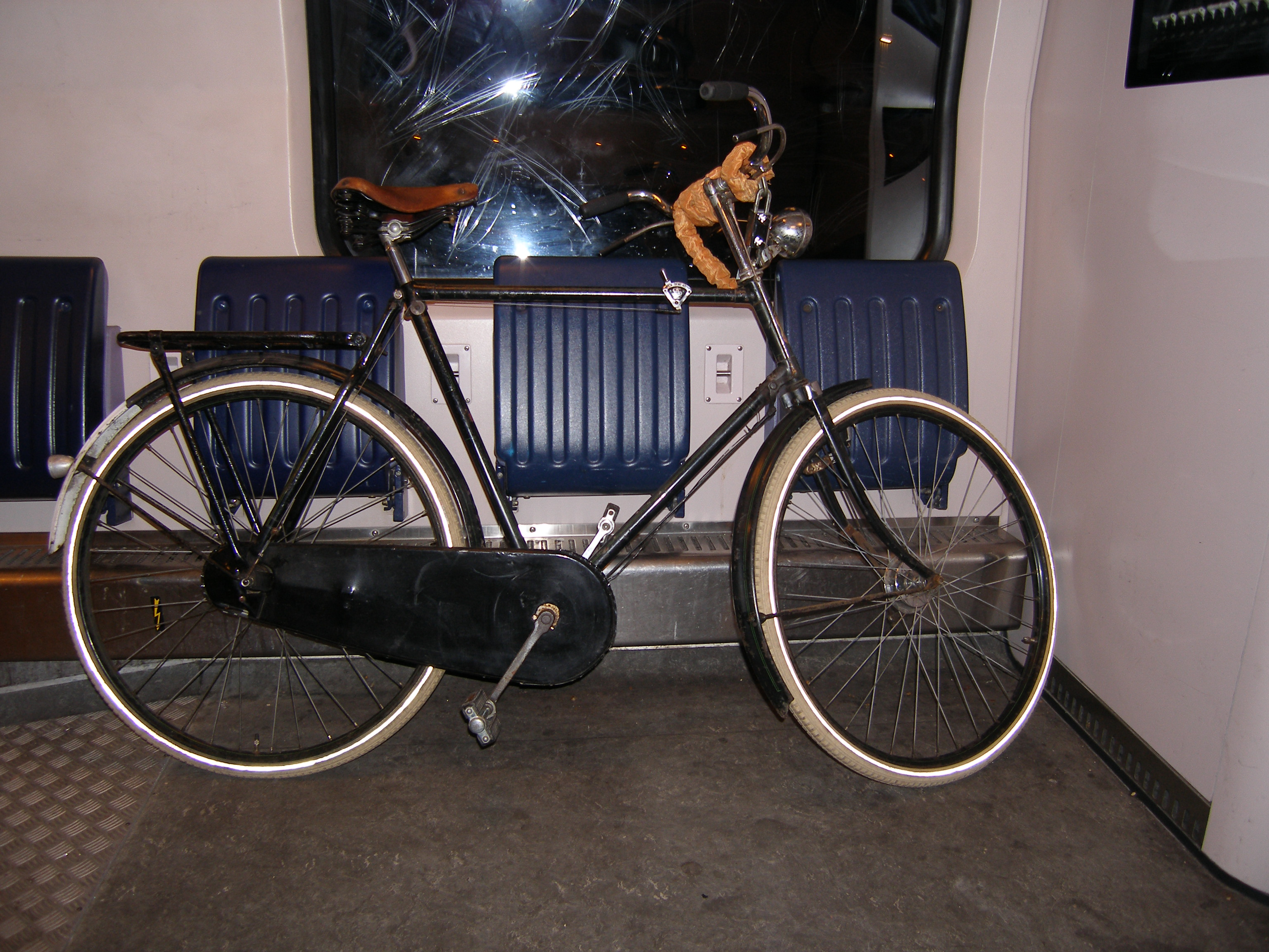 een nog steeds operationele Fongers uit 1960